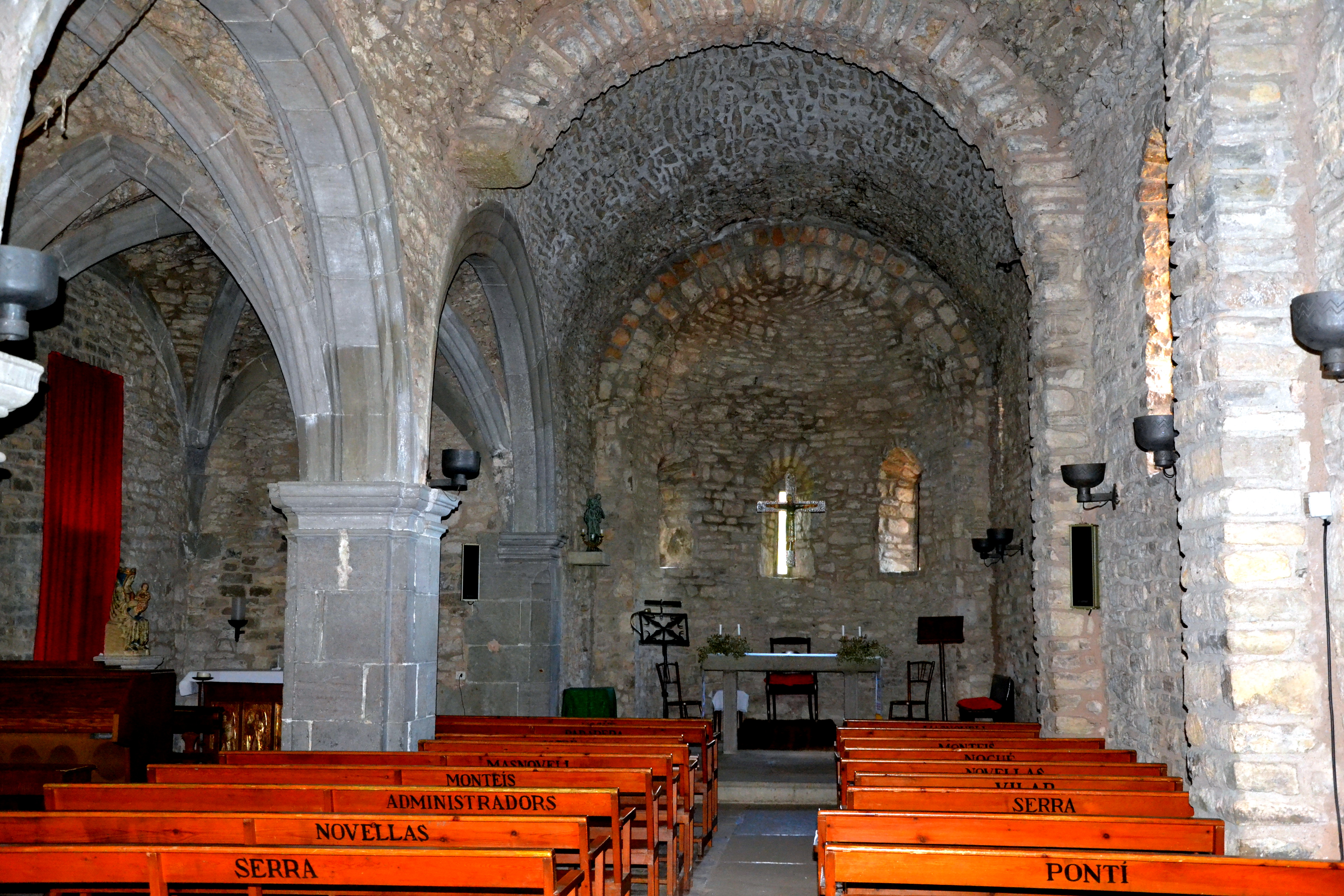 Romànica, s. XI, amb absis circular. Nau central romànica i nau lateral gòtica. Imatge de la MAre de Déu del Cor. Església del nucli de Tavertet.